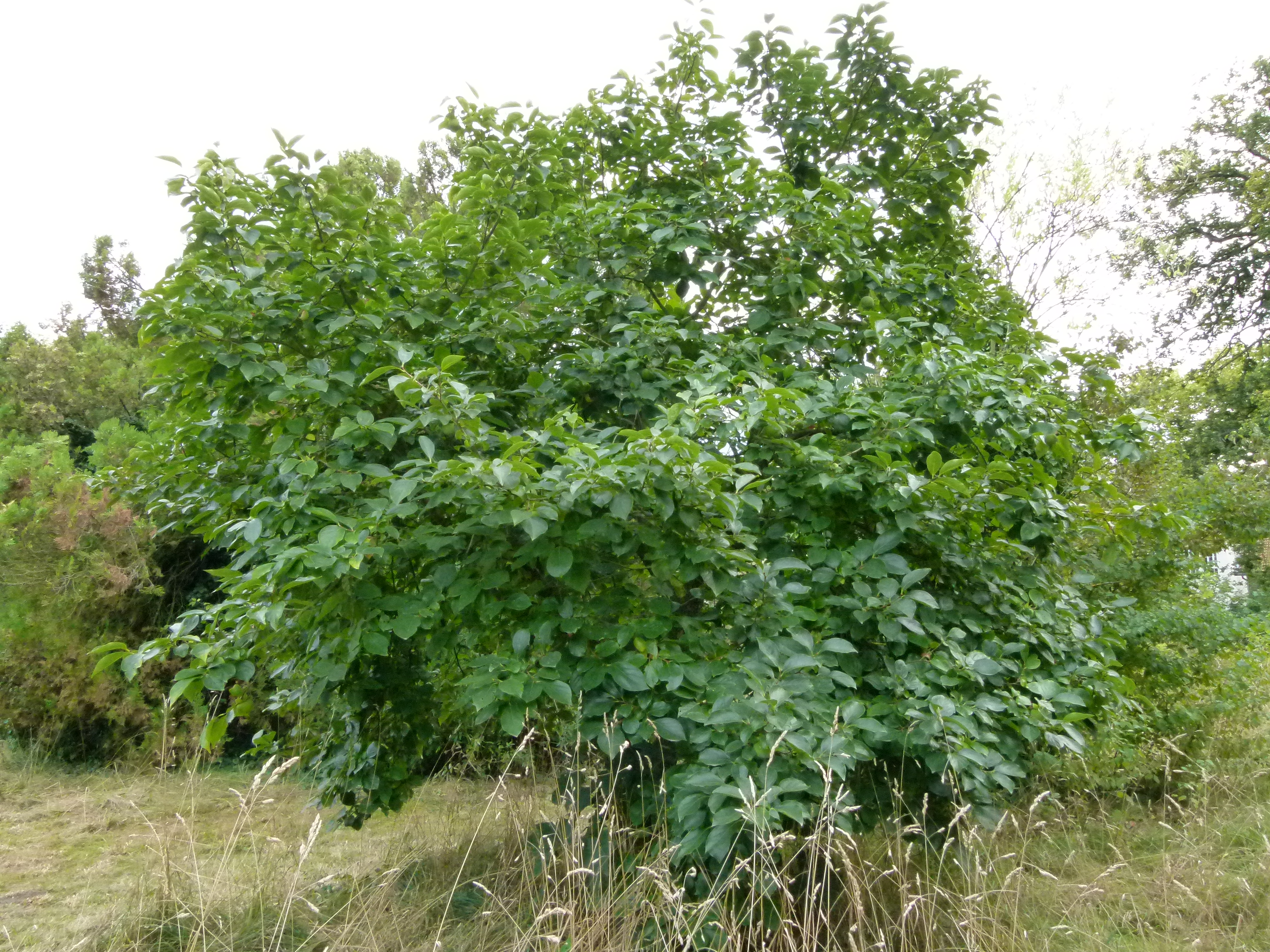 Arbre aux Kakis - Jardin Agronomique Tropical